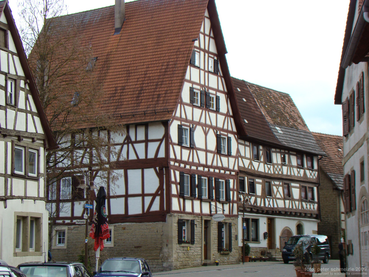 Historisches Gebäude Altstadtstraße 34 in Eppingen